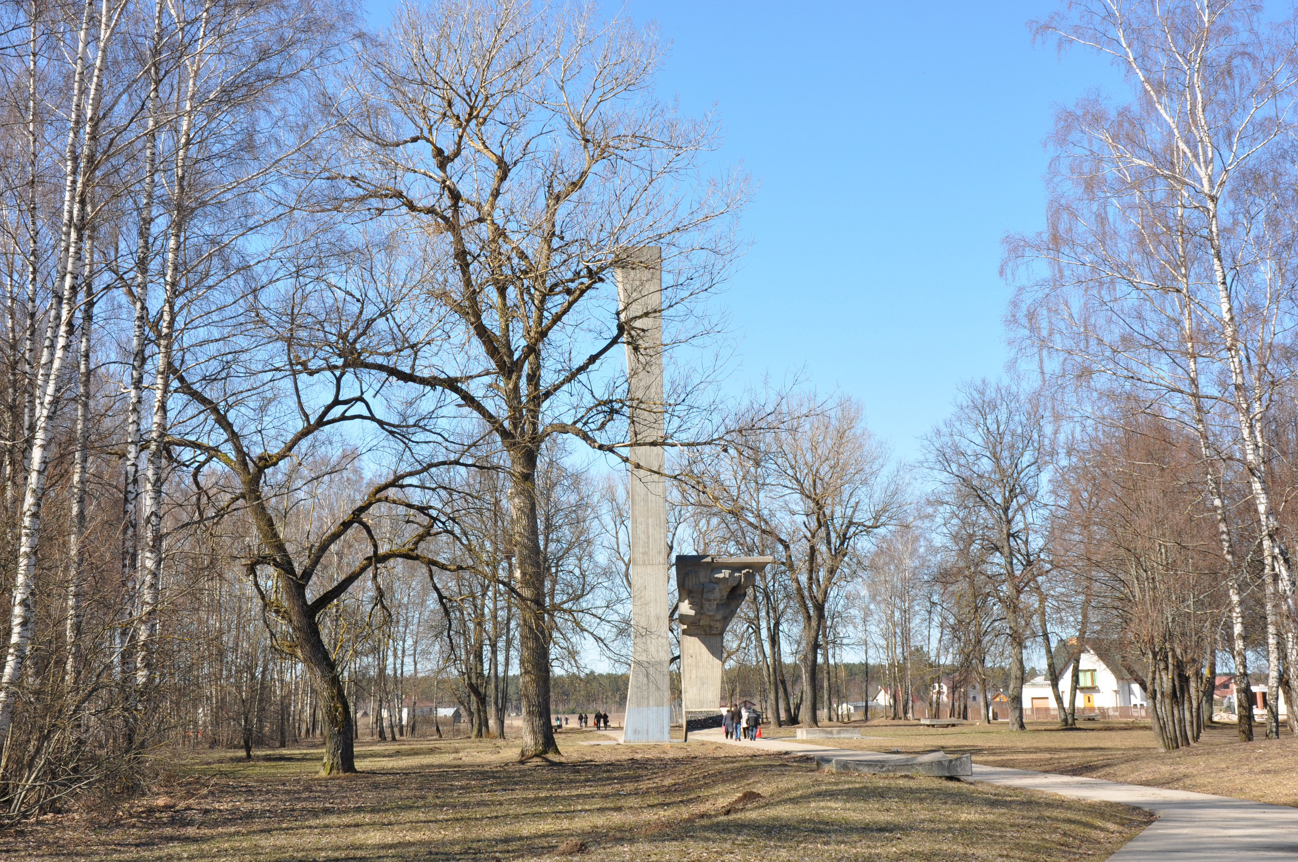 Stalag 350/Z piemiņas vieta (apglabāti vairāki desmiti tūkstoši Sarkanās armijas karavīru) WWII, Tilderi, Salaspils pagasts, Salaspils novads, Latvia